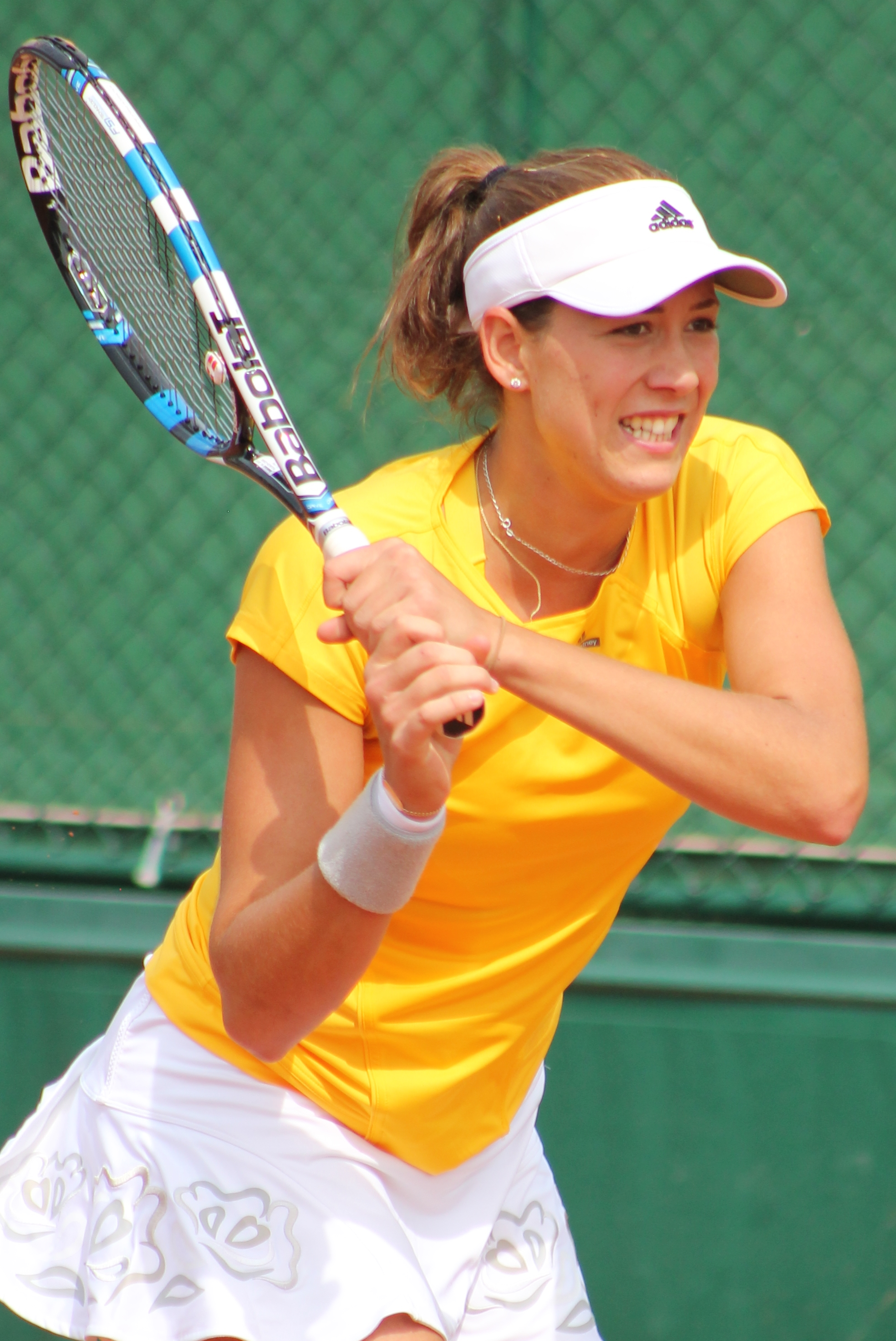 Muguruza RG15 (24)